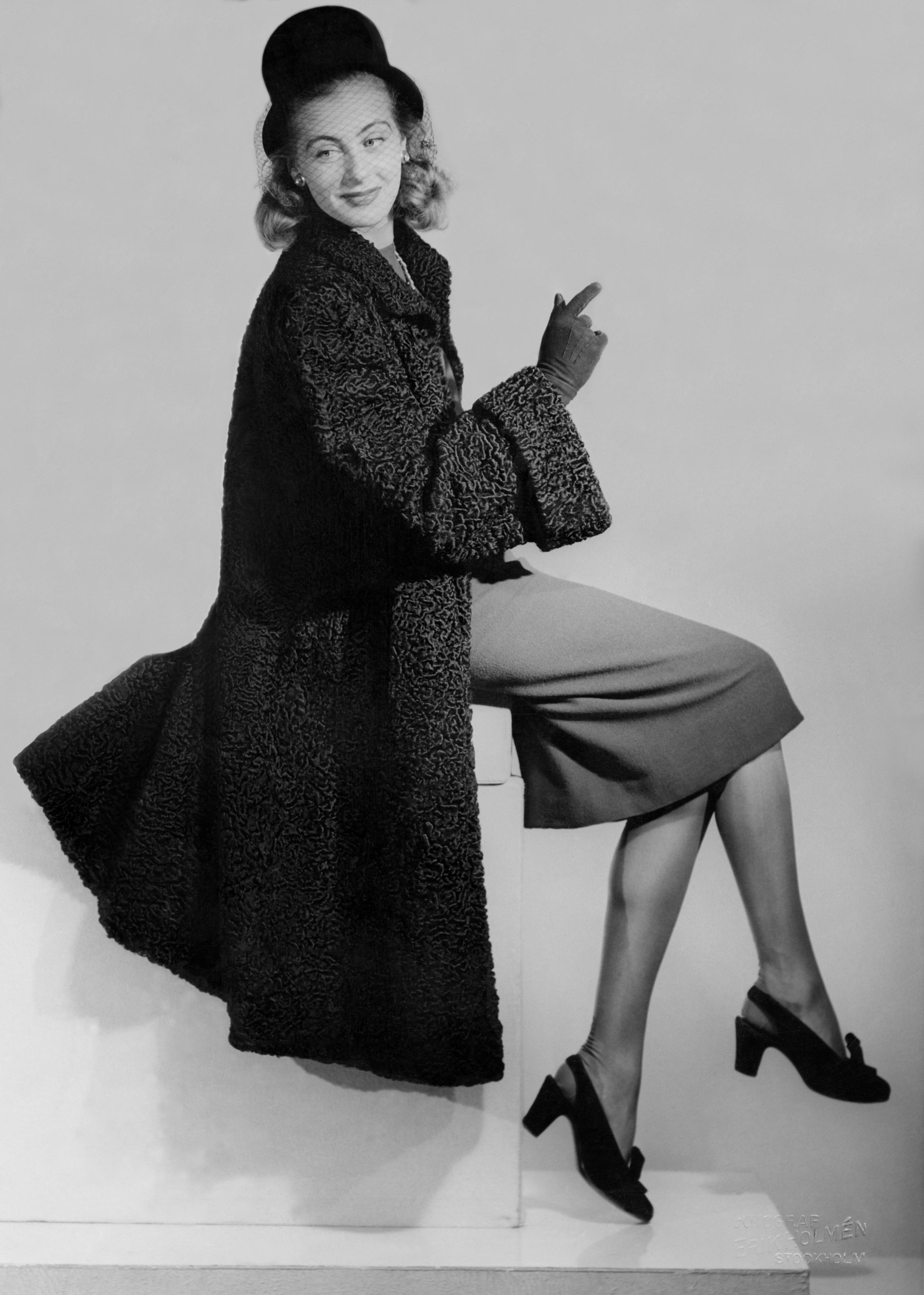 Nordiska Kompaniet visar pälsmode. Modell klädd i persianpäls och hatt med flor. Ämnesord: Kläder, Kläder : Ytterkläder, Kvinna, Mode. (Nordiska Kompaniet showing fur fashion . Model dressed in Persia coat and hat with veil).